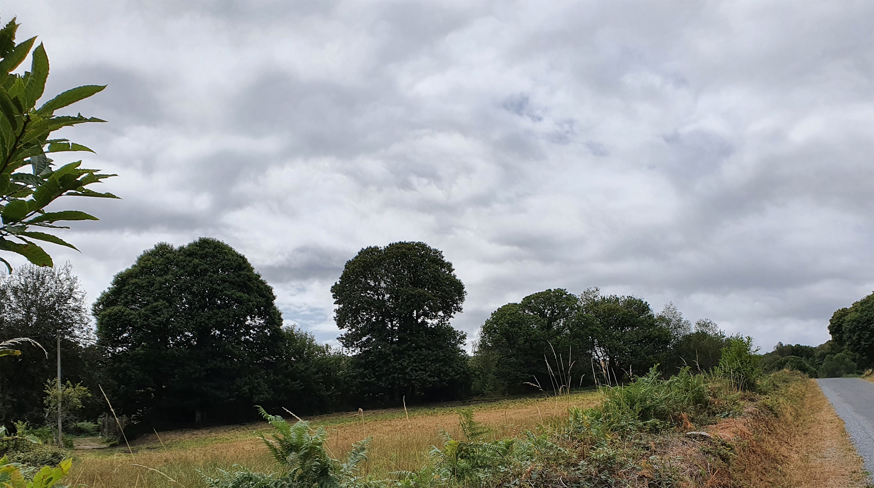 Lugar da Parrocha, enclave máis ao sur da parroquia de San Mamede de Agüela, do Concello de Antas de Ulla. Conta cunha soa vivenda.